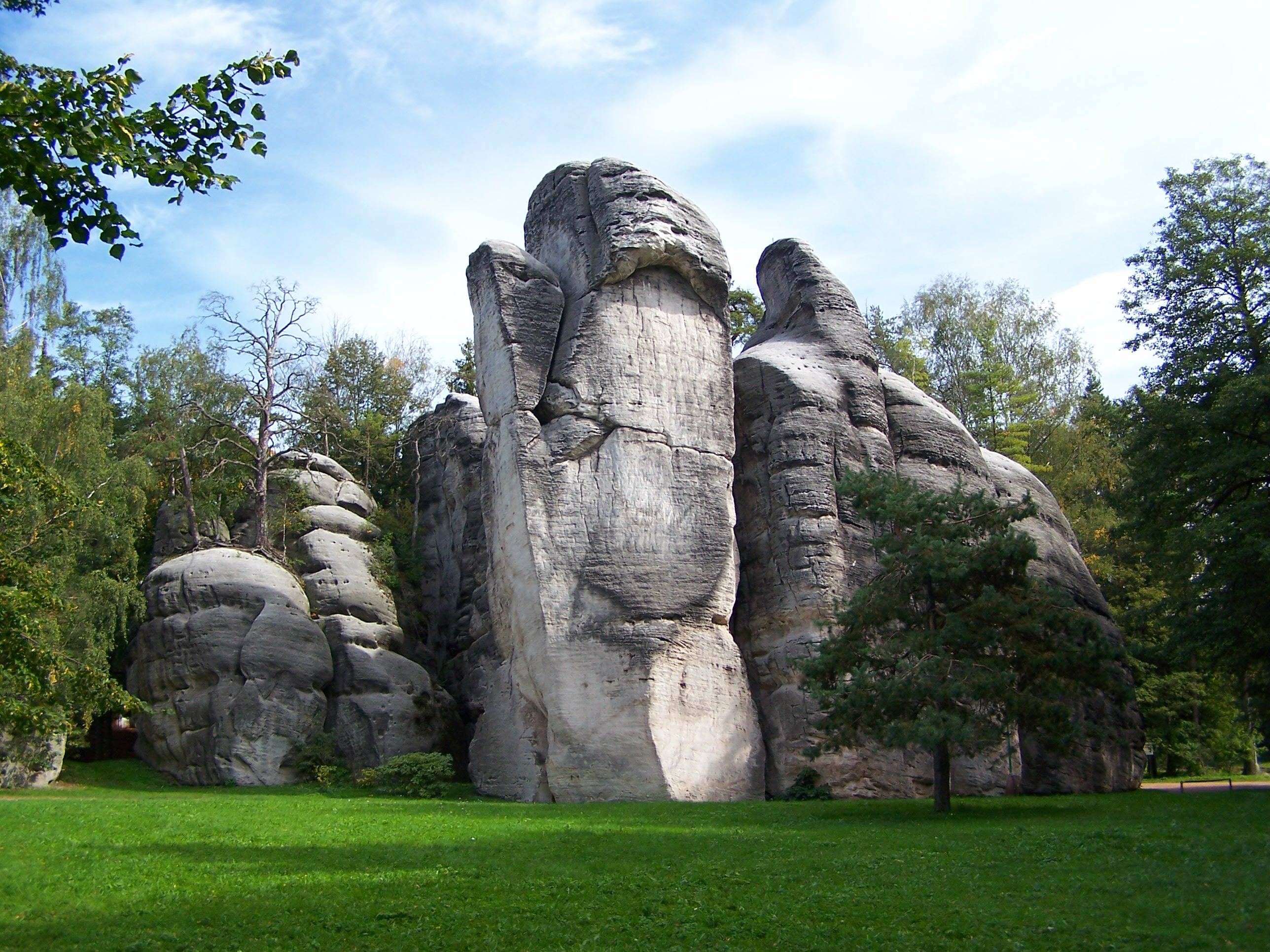 Adršpašskoteplické skály.